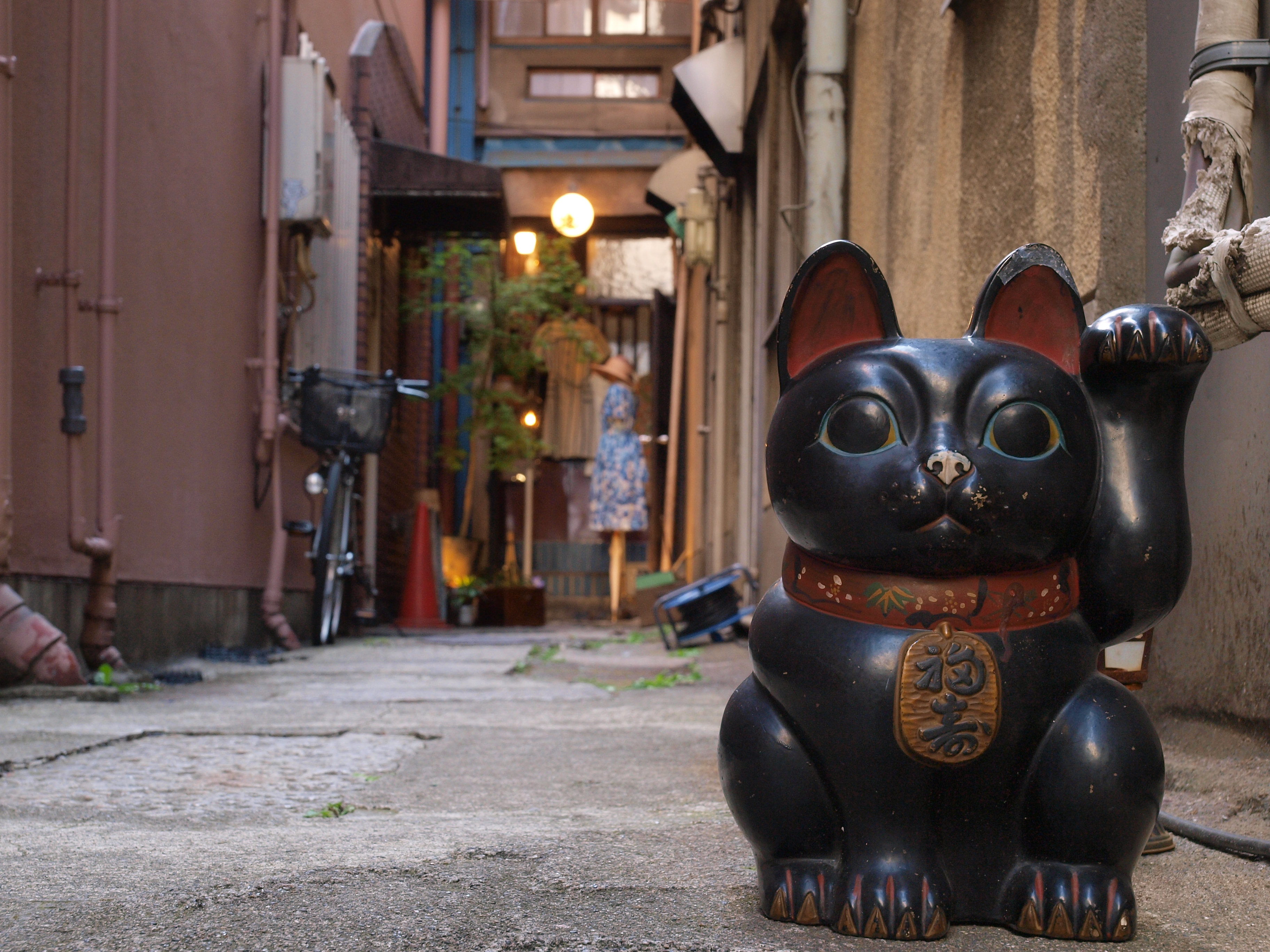 Maneki neko at Asasuka